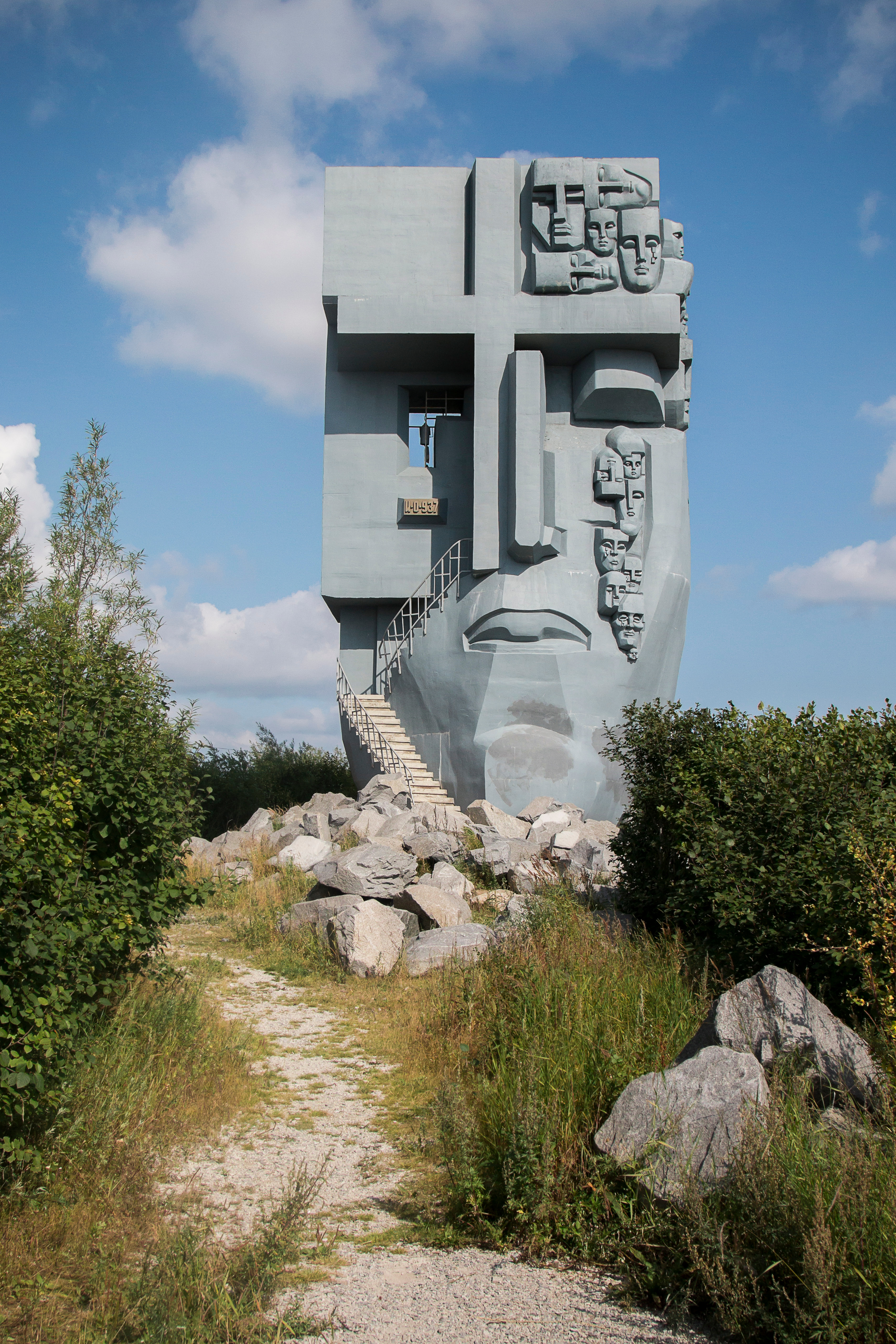 Мемориальный комплекс жертвам политических репрессий «Маска Скорби»: сопка Крутая, Магадан, Магаданская область